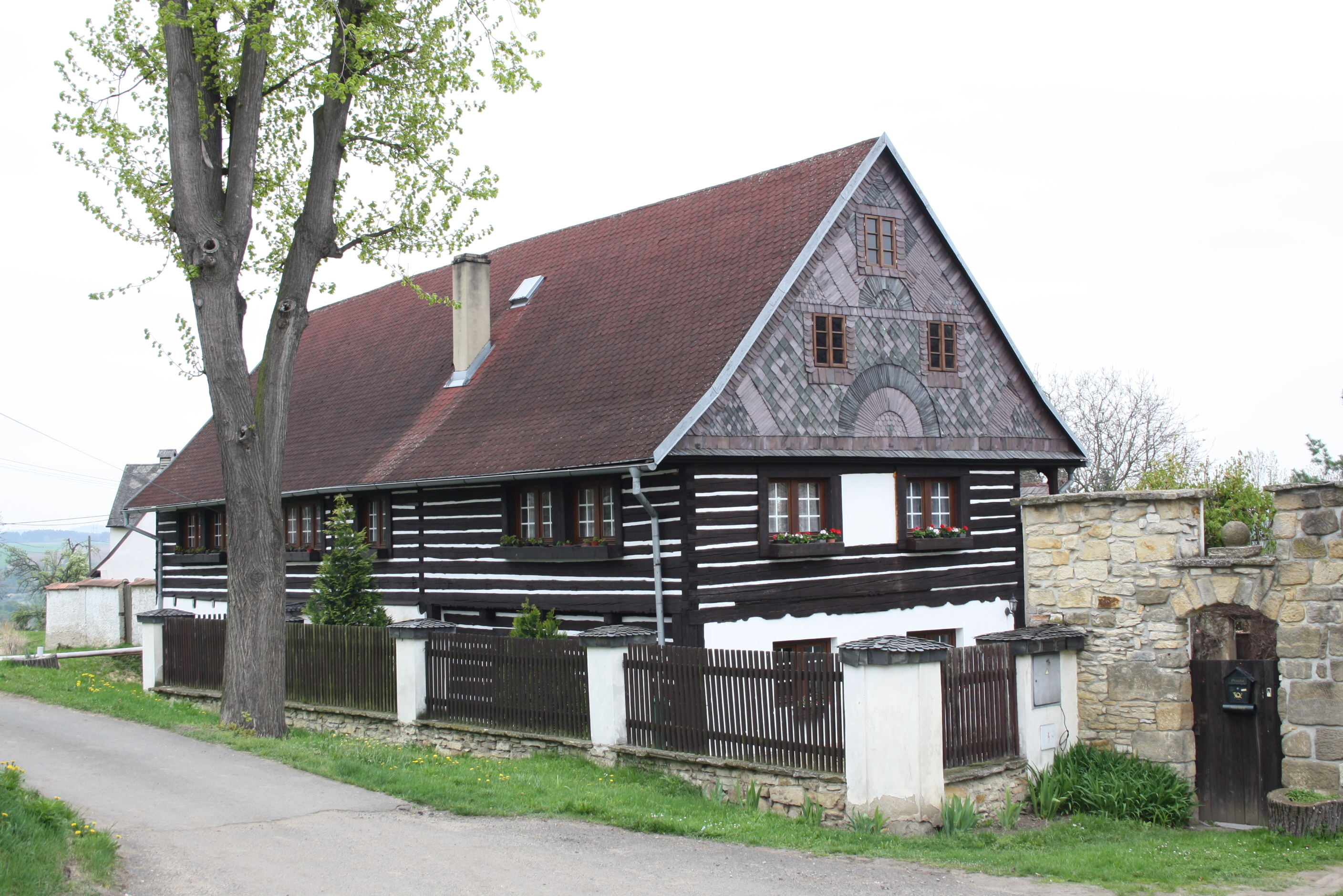 Dům číslo popisné 20 v Jištěrpách, části Chotiněvsi.